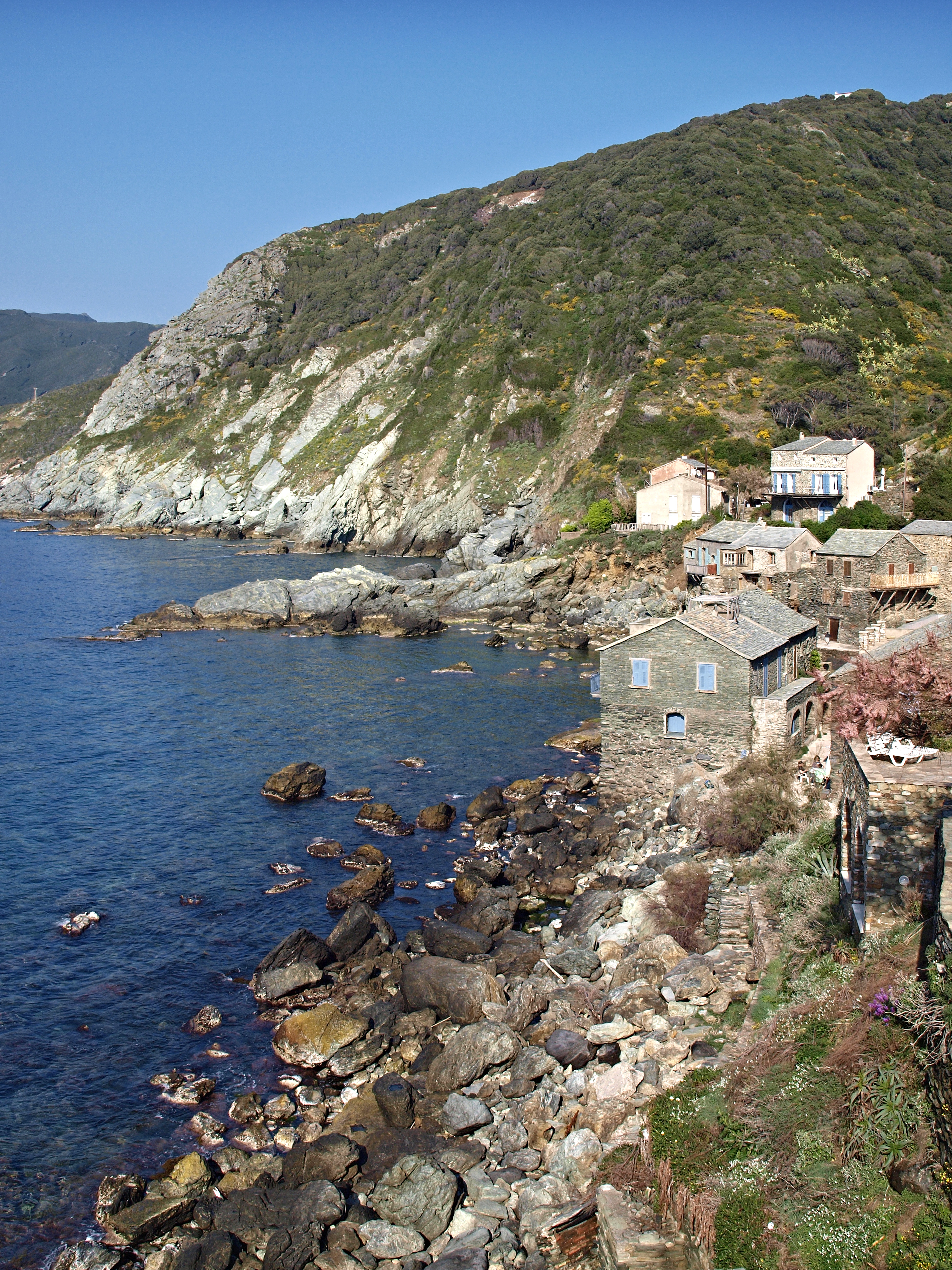 Pino (Corsica) - Marine de Scalo